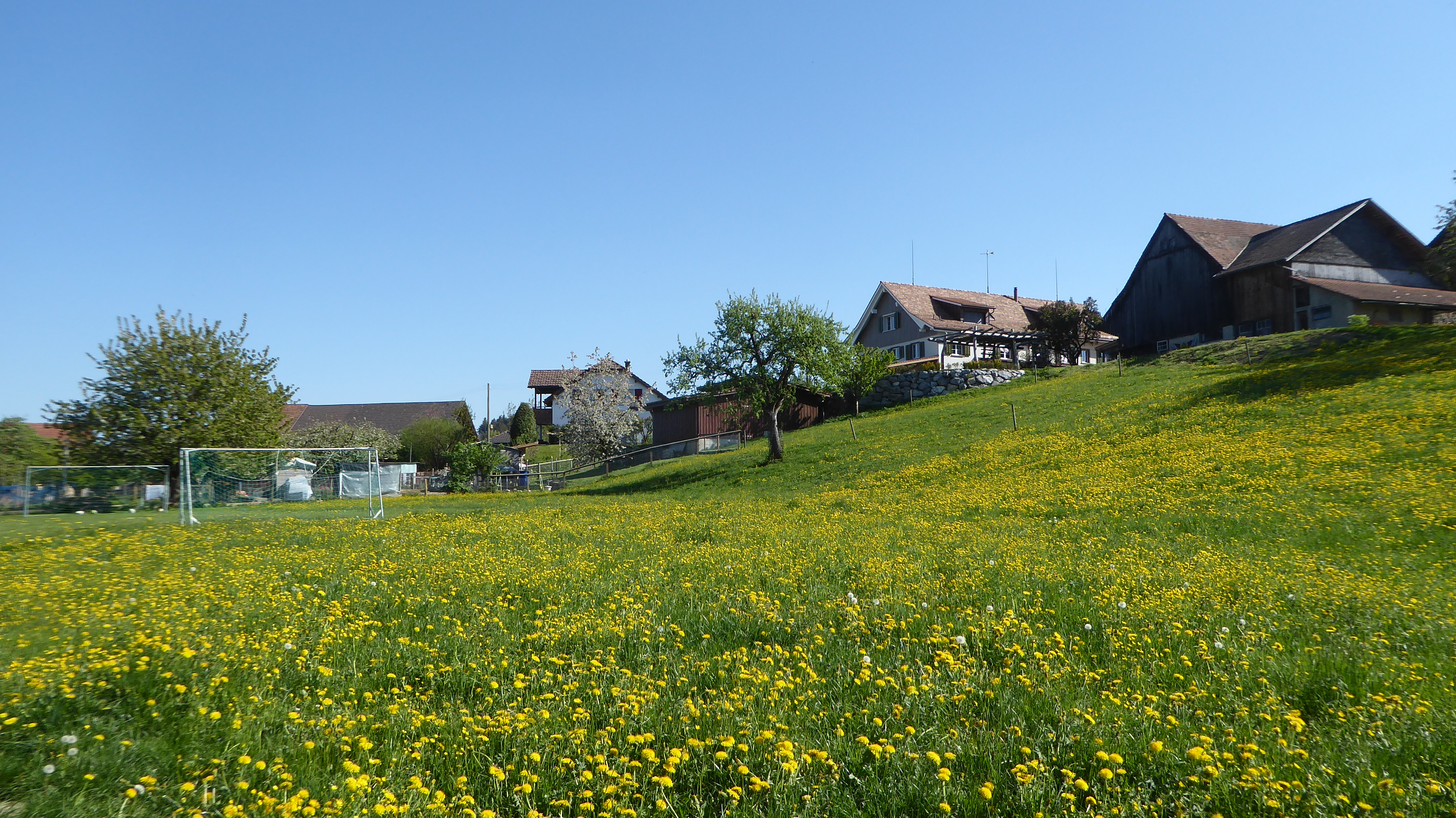 Krillberg, von Süden gesehen